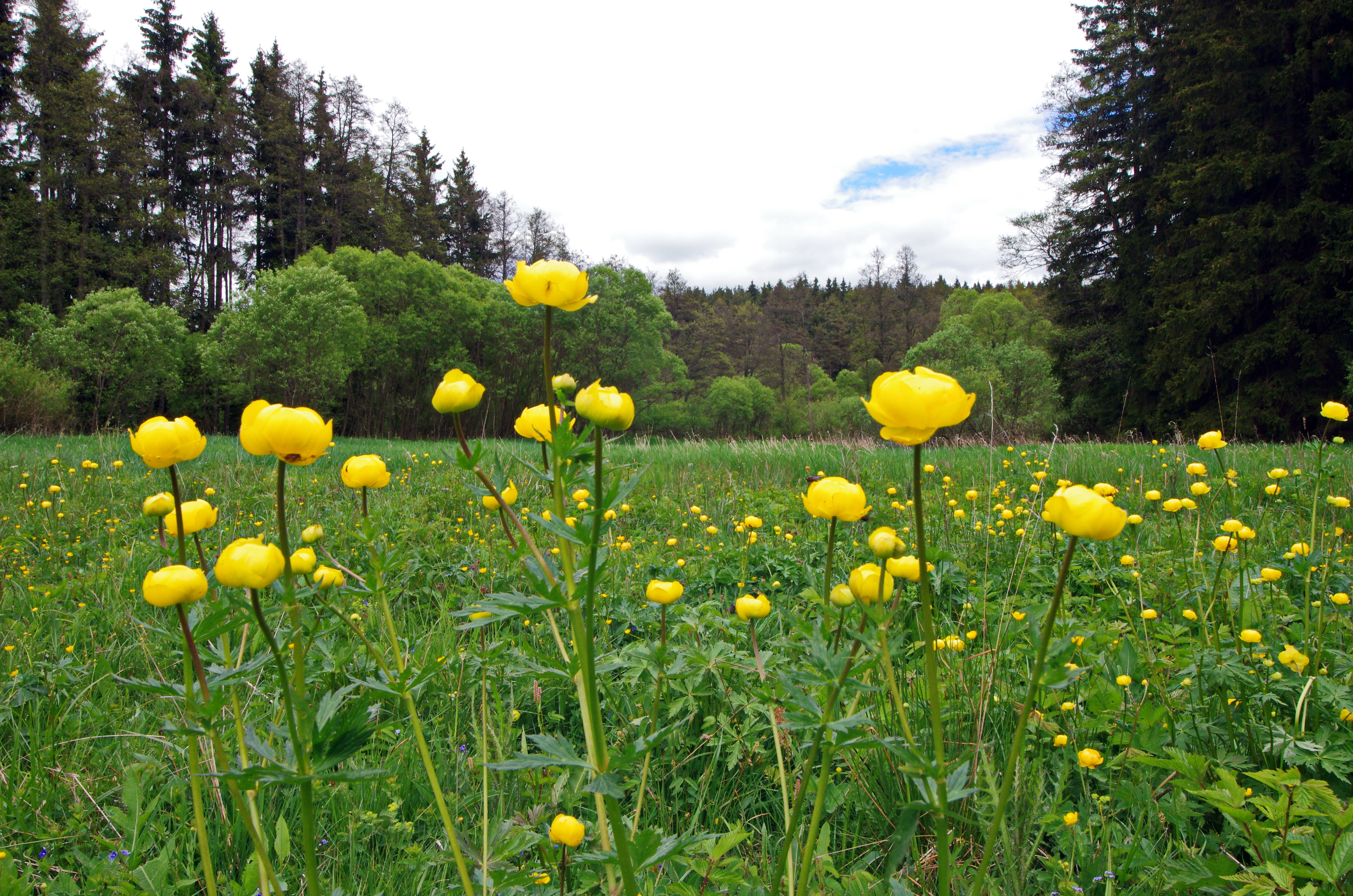 Upolín evropský (Trollius europaeus), nedaleko Mnichova, Slavkovský les, okres Cheb